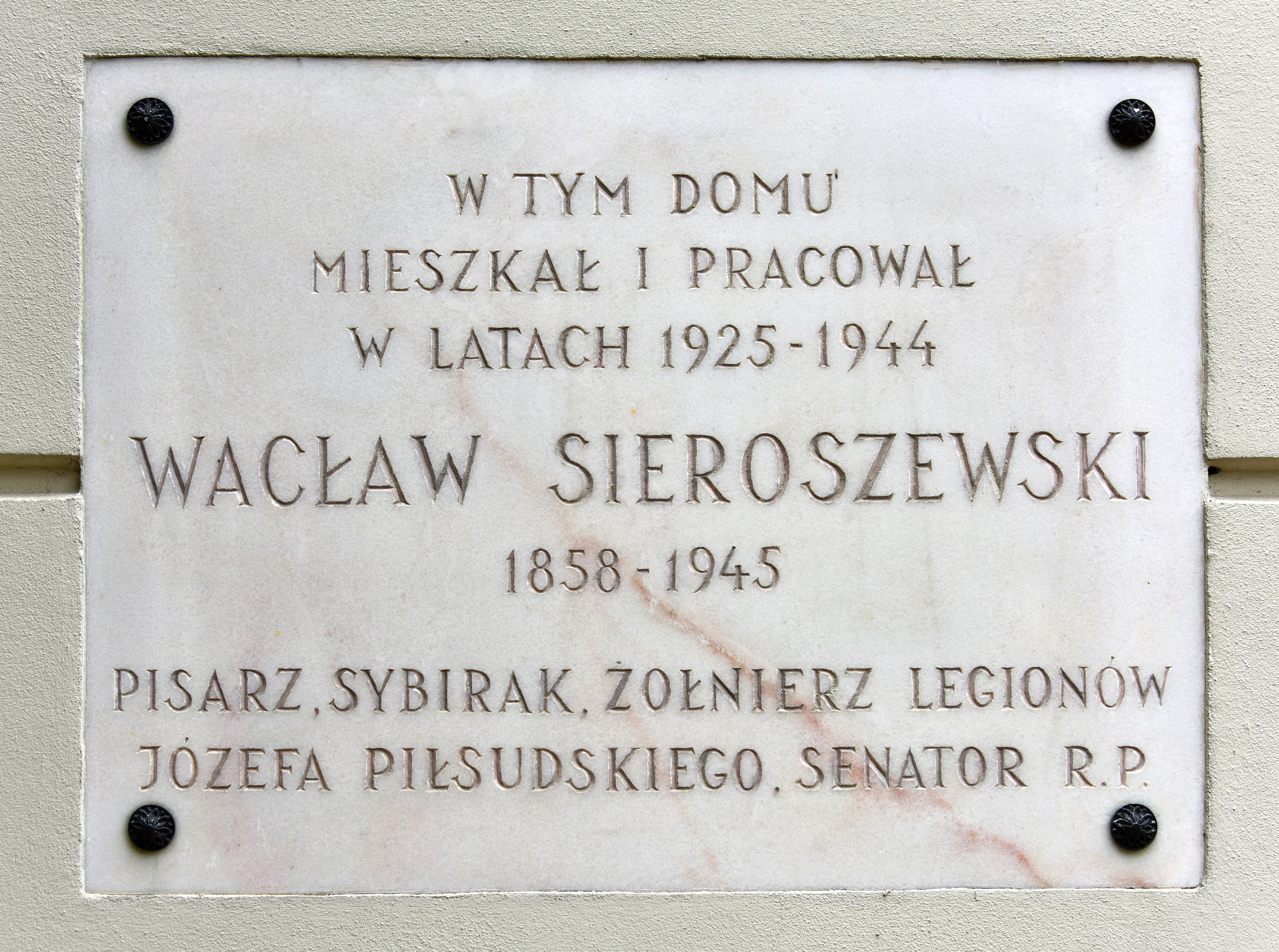 Tablica upamiętniająca Wacława Sieroszewskiego na fasadzie budynku przy ul. Górnośląskiej 16 w Warszawie